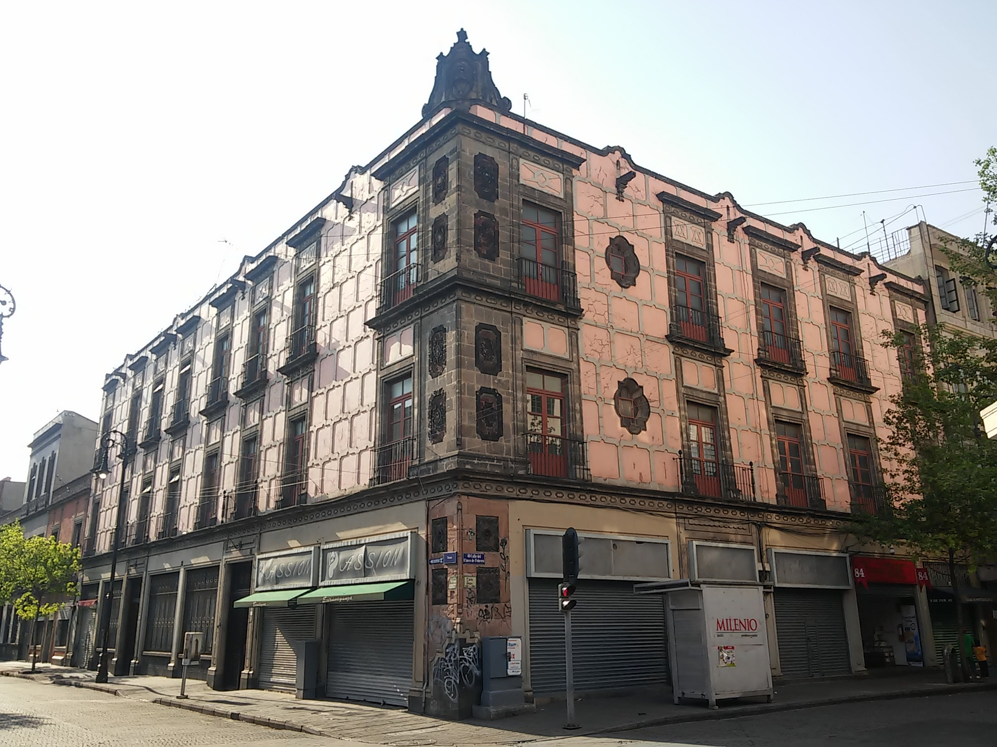 Edificio en la esquina de las calles 5 de febrero y mesones en el centro histórico de la ciudad de México